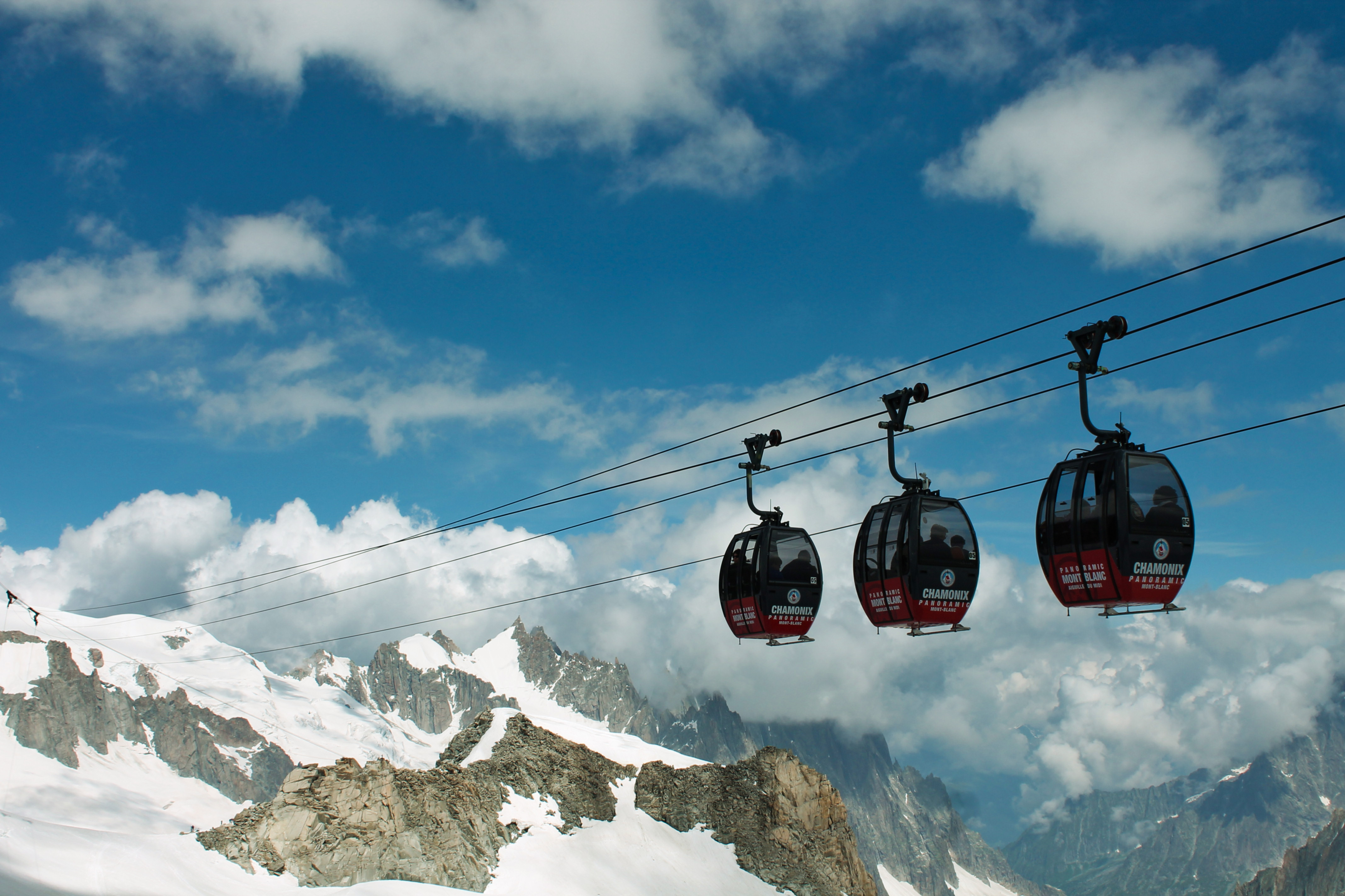 Ambienti Glaciali del Monte Bianco e collegamento tra Courmayeur e Chamonix